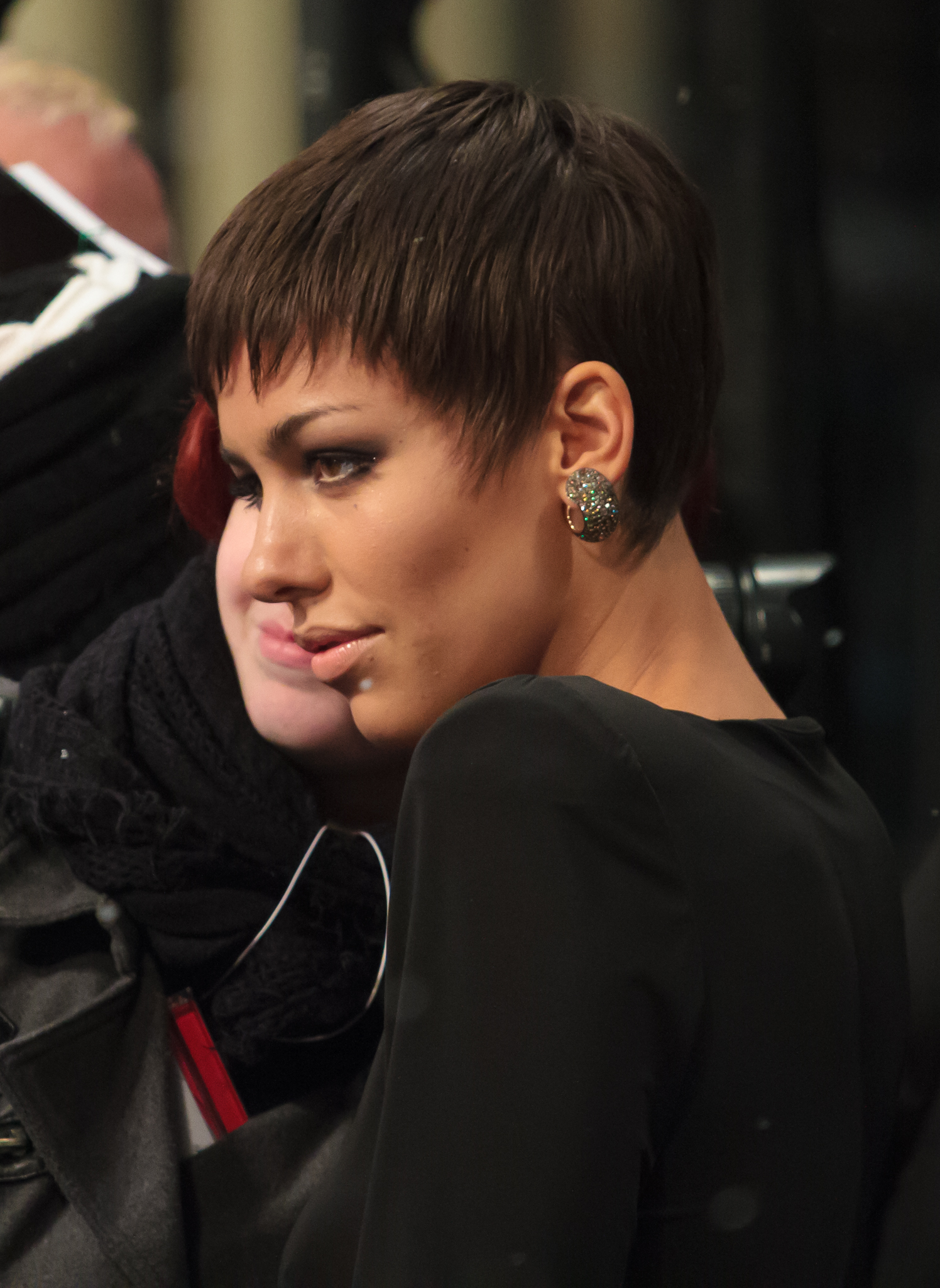 Alina Süggeler von Frida Gold beim Echo 2013